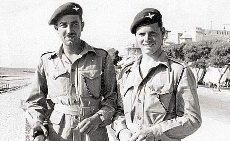 כלניות (כינוי לשוטרים בריטים) בחוף תל אביב